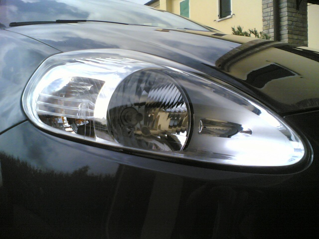 particolare dei fari della nuova Fiat Grande Punto